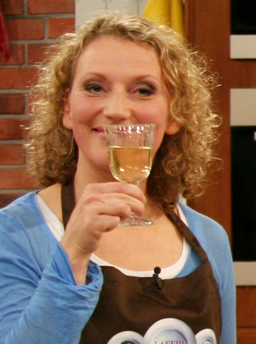 Julia Westlake mit Horst Lichter und Johann Lafer bei der Fernsehaufzeichnung Lafer! Lichter! Lecker!